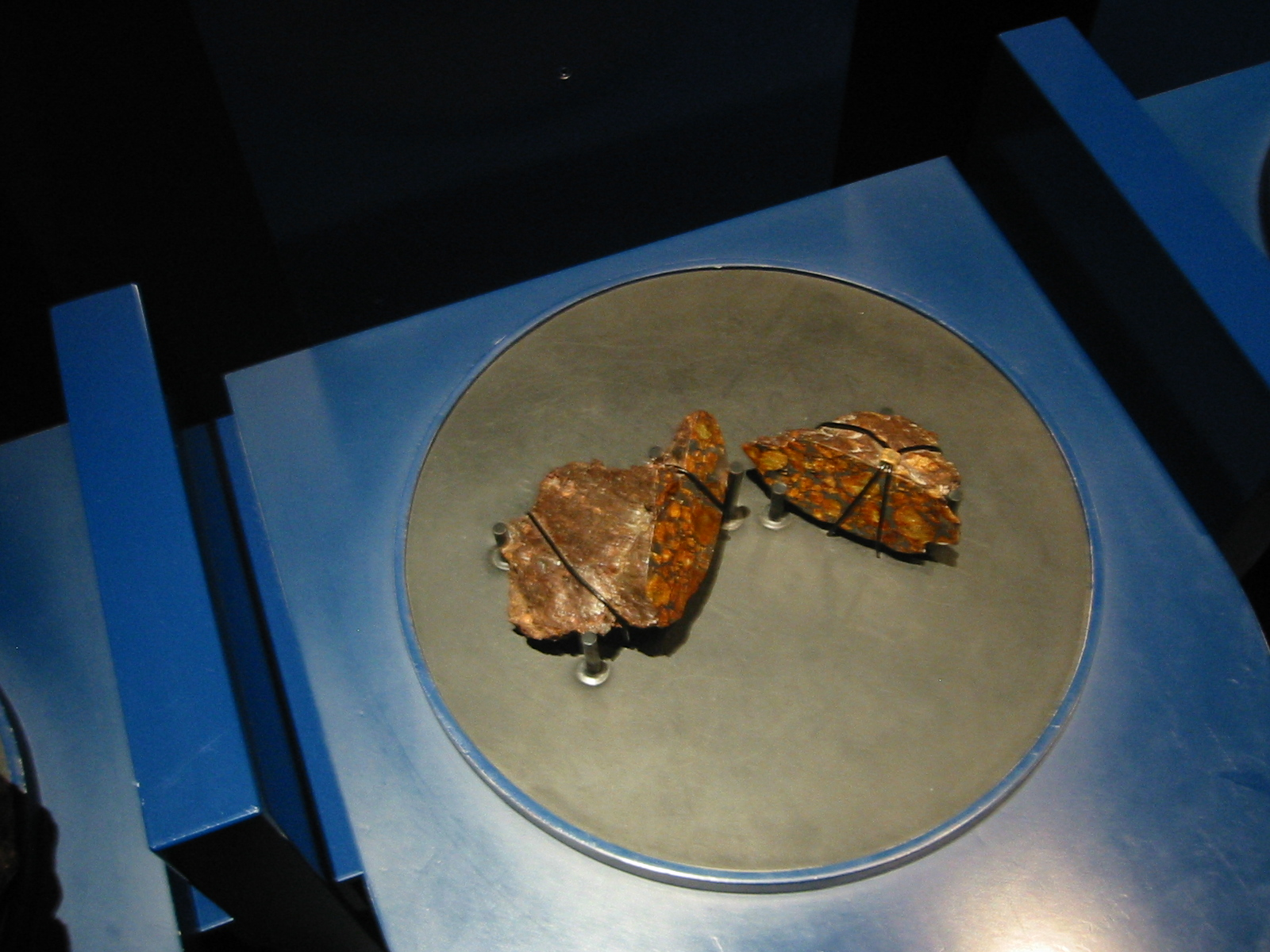 1882年チリ・アタカマ砂漠で発見された石鉄隕石重さ1㎏ 明石天文科学館にて